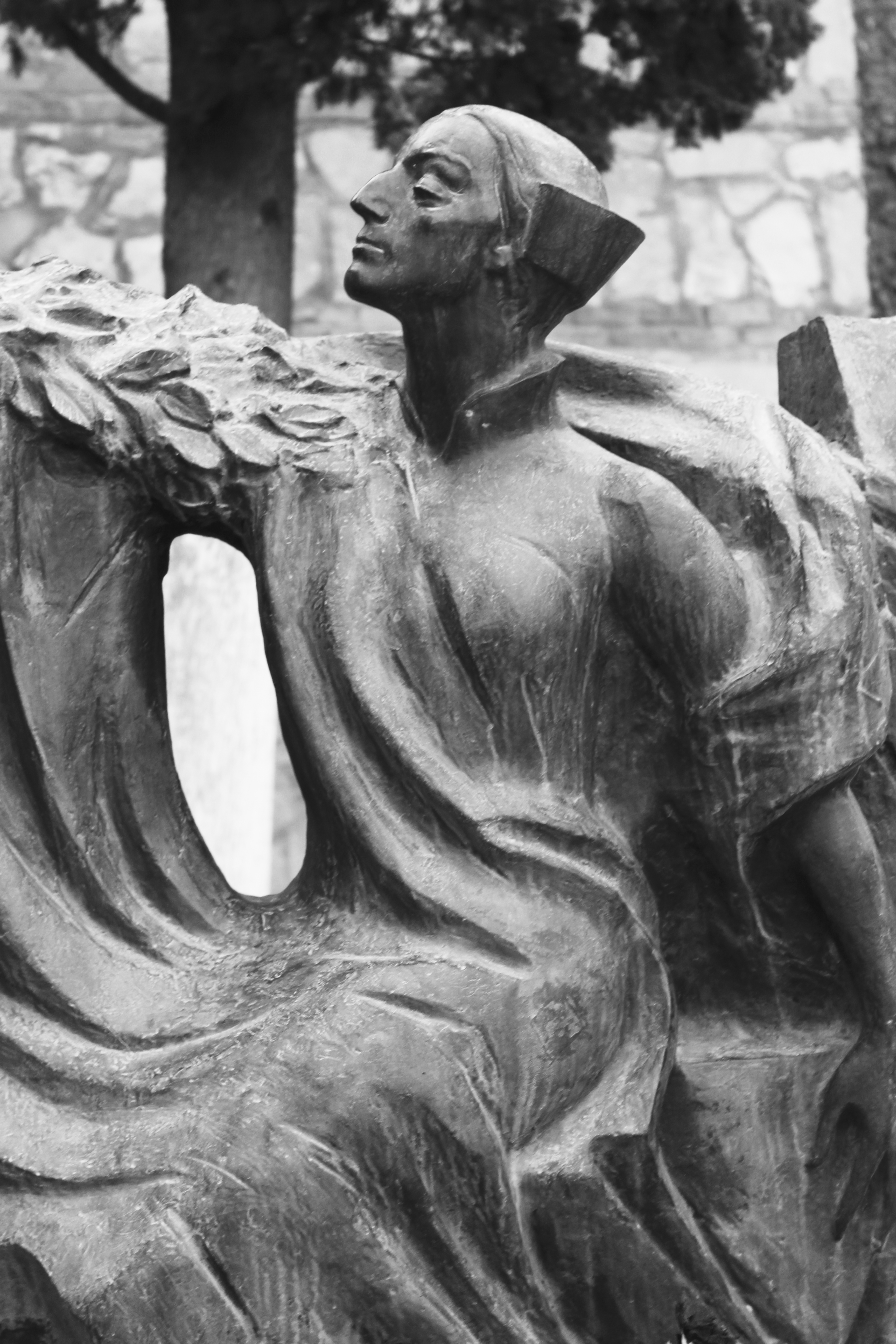 მთაწმინდის პანთეონი